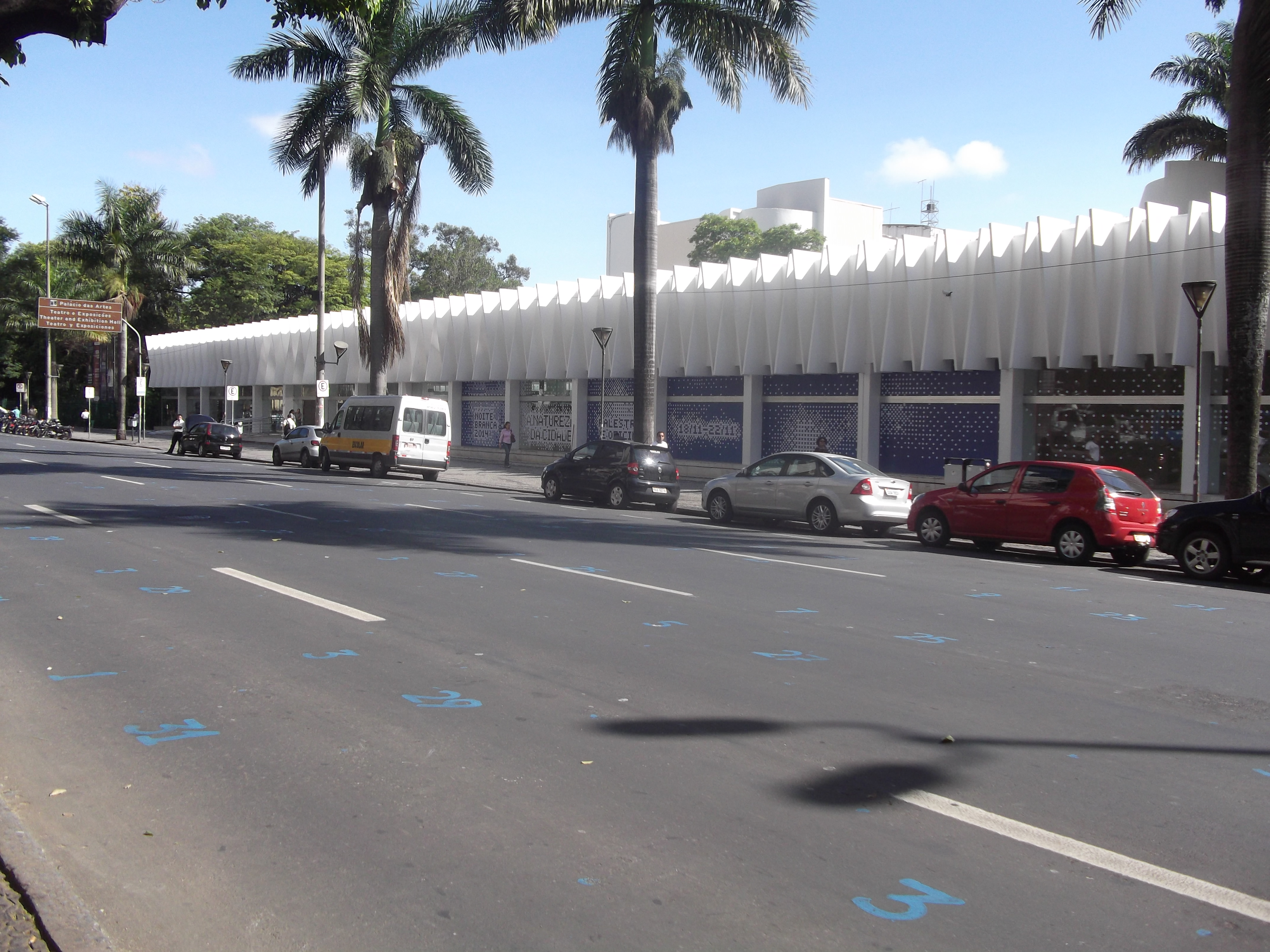 Palácio das Artes, Belo Horizonte, Brasil